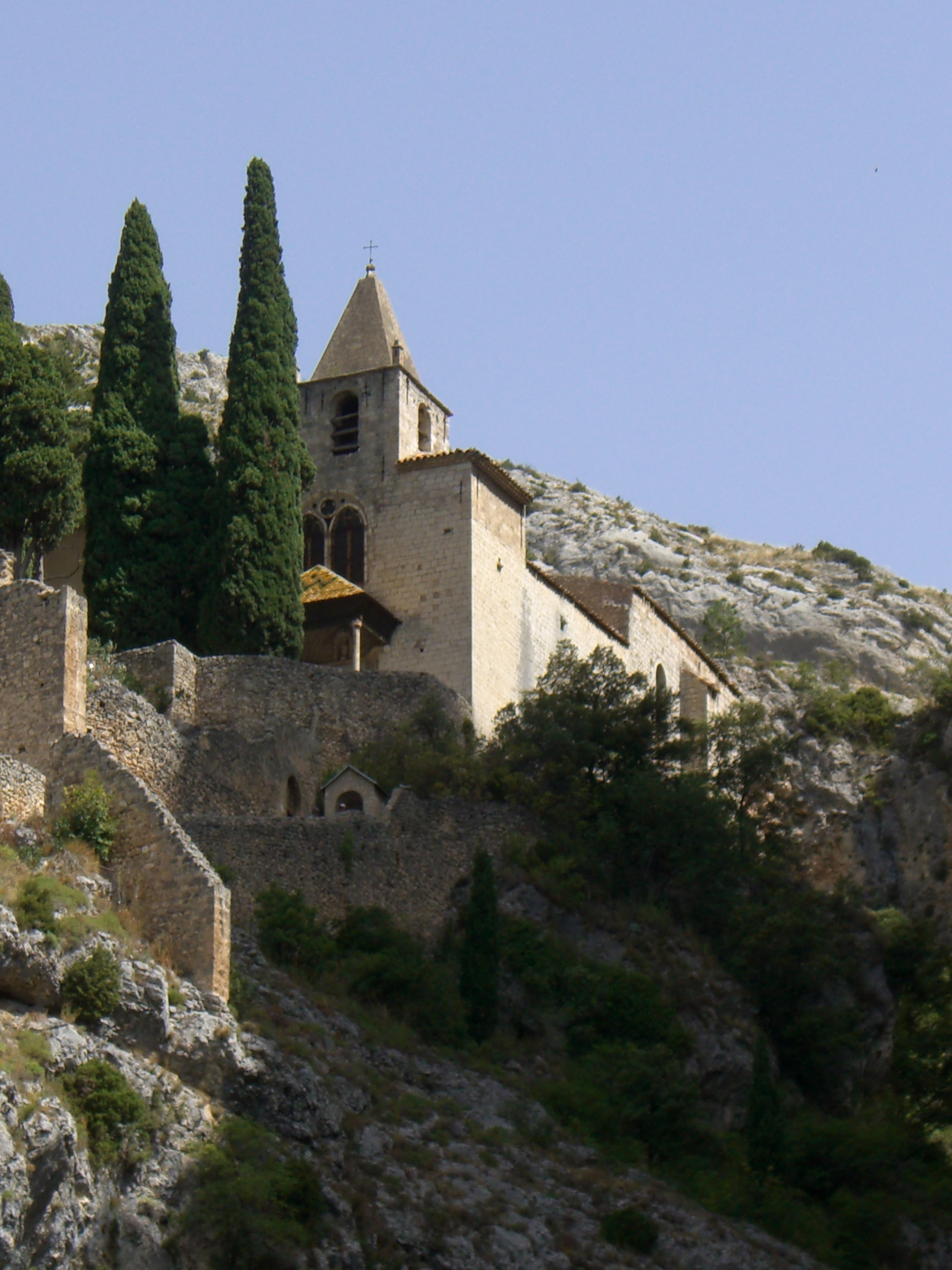 Chapelle Notre Dame de Beauvoir, Moustiers-Sainte-Marie, Alpes-de-Haute-Provence